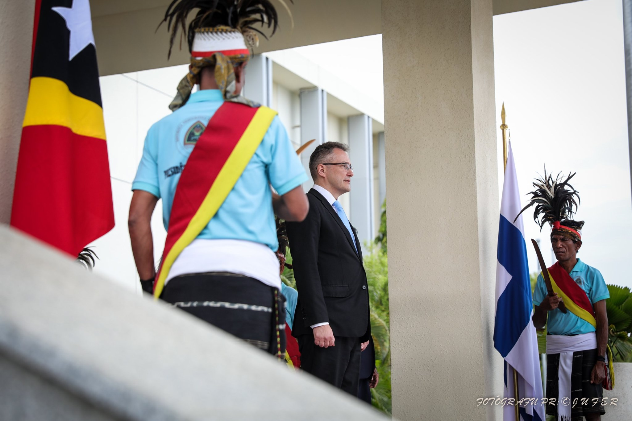 Präsident Francisco Guterres nimmt die Akkreditierung der neuen Botschafter in Osttimor entgegen: Finnland: Jari Sinkari Vereinigtes Königreich: Owen John Jenkins Polen: Beata Stoczynski Tetun: Prezidente Repúblika Francisco Guterres Lú Olo, ohin, simu karta kredensiál husi Embaixadór Finlandia, Jari Sinkari, Embaixadór Reinu Unidu, Owen John Jenkins, no Embaixadora Polónia, Beata Stoczynski atu hametin liután kooperasaun no amizade ho Timor-Leste.